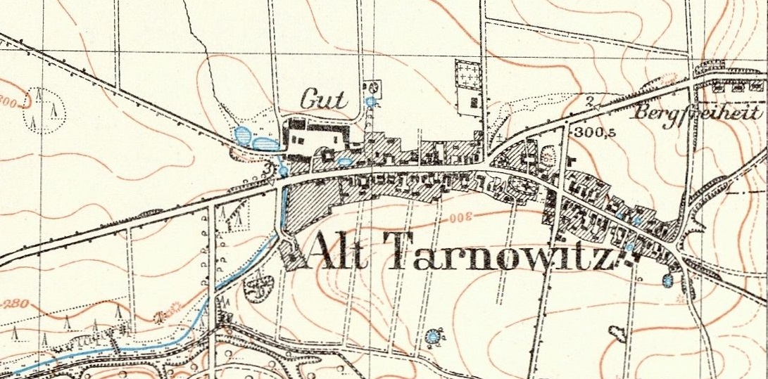 Stare Tarnowice na niemieckiej mapie z 1933 roku (na podstawie mapy z 1883)